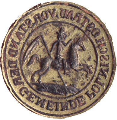 Pečetidlo města Slezská Ostrava vzniklé mezi rokem 1850 až 1879.